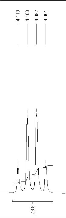 NMR-Quartett-Aufspaltung Bild selbst erstellt mit MestreC, gemessen und Stoff hergestellt an der Universität Ulm